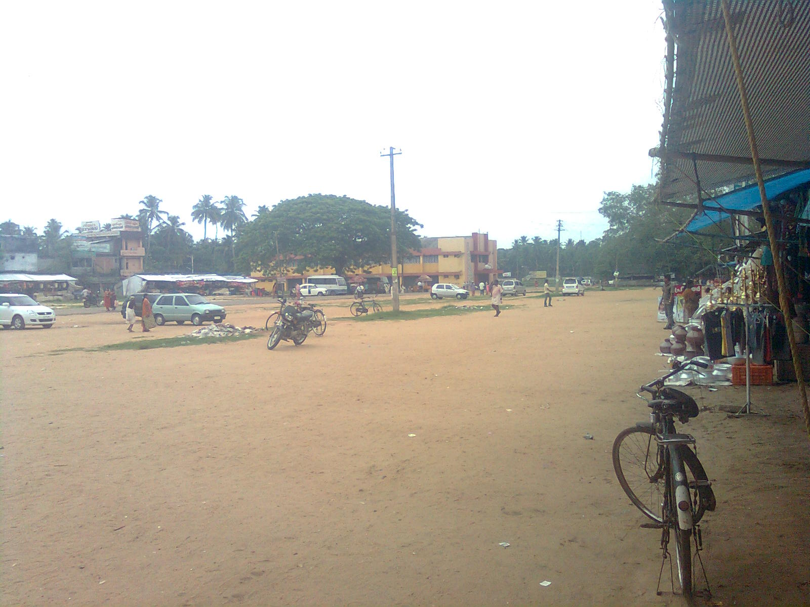 ഓച്ചിറ പരബ്രഹ്മക്ഷേത്രത്തിലെ മൈതാനം